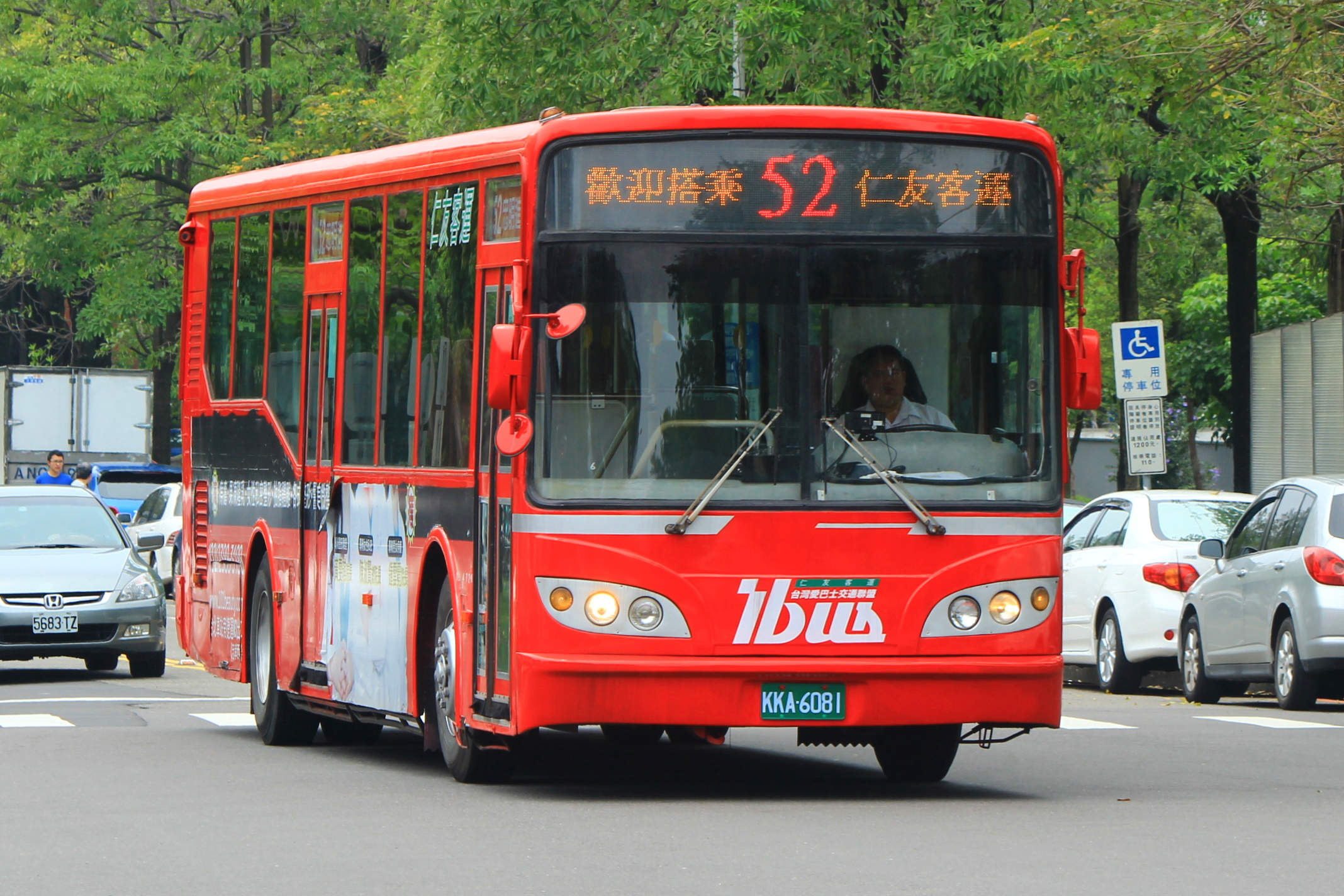 仁友客運三菱扶桑RM117NL大客車KKA-6081，為大有巴士移籍車，行駛台中市公車52路。